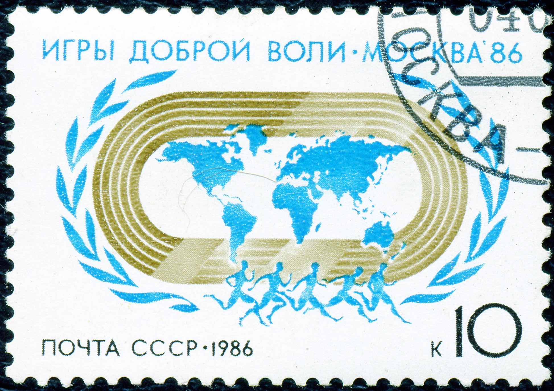 Почтовая марка СССР. 1986. Игры доброй воли